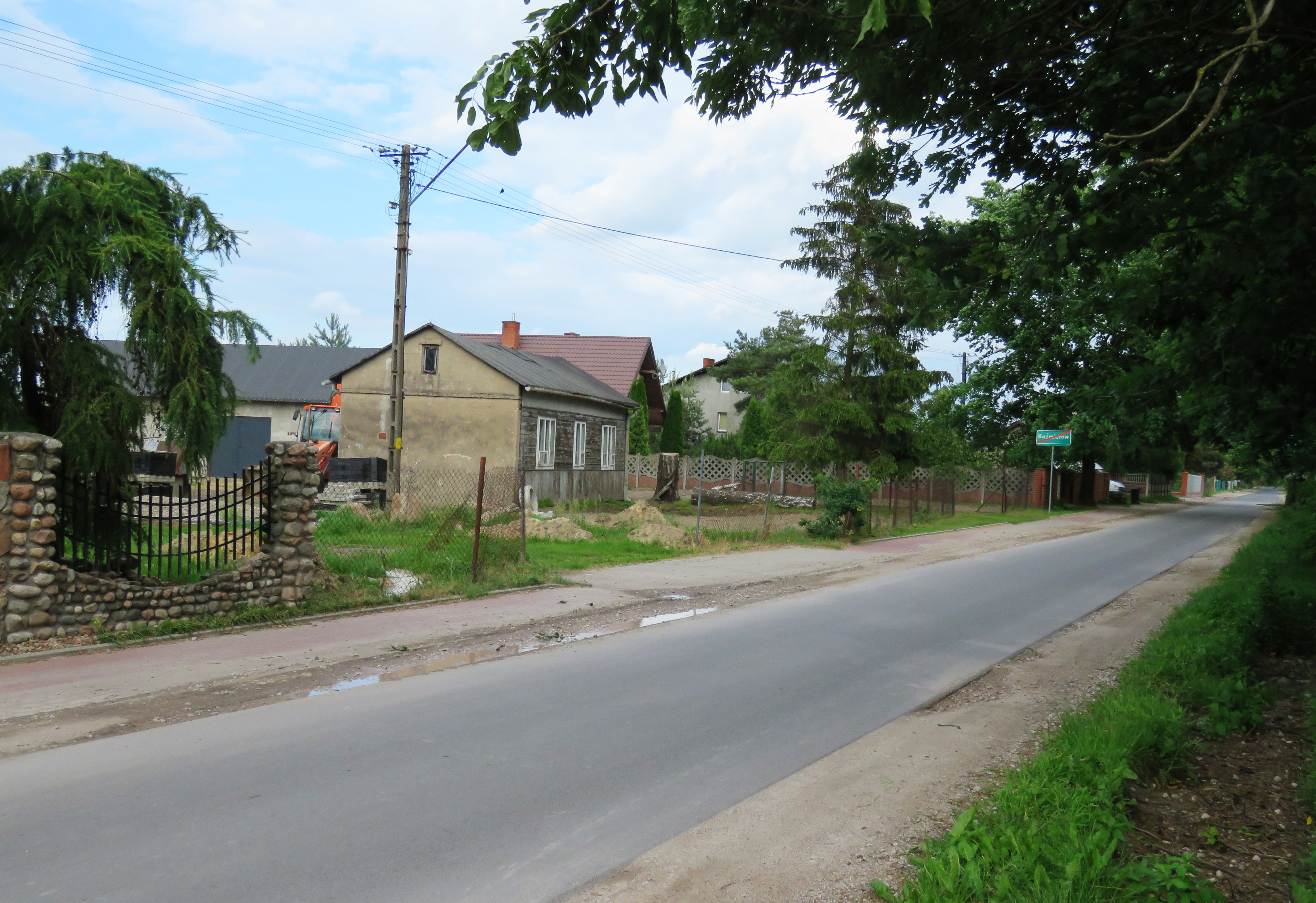 Kaźmierów, gmina Sochaczew